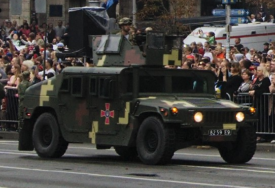 HMMWV M1114 UAH 80-й аэромобильной бригады